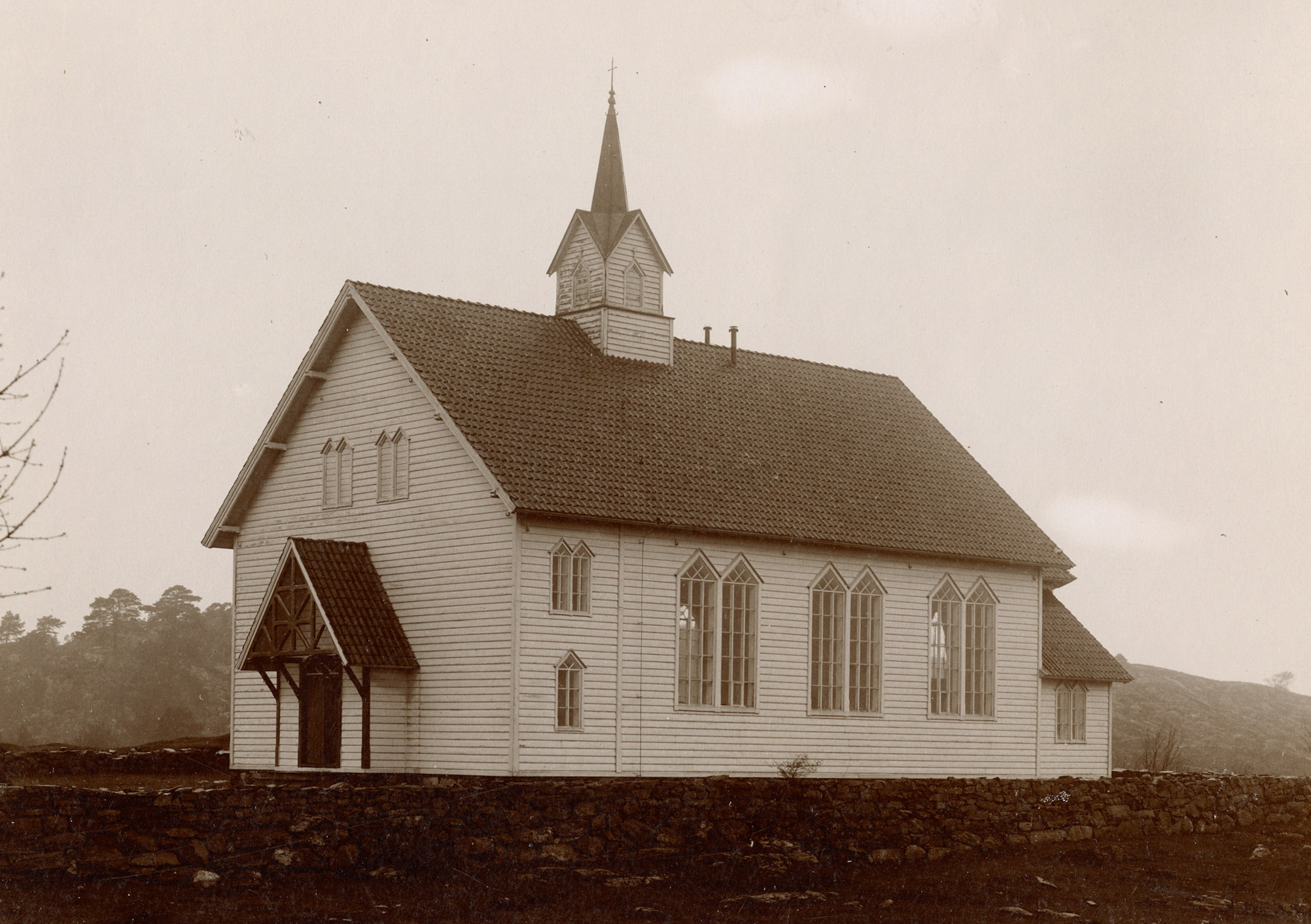 Moster kirke. Foto: Christian Christensen Thomhav, fra Kulturminnebilder.no.